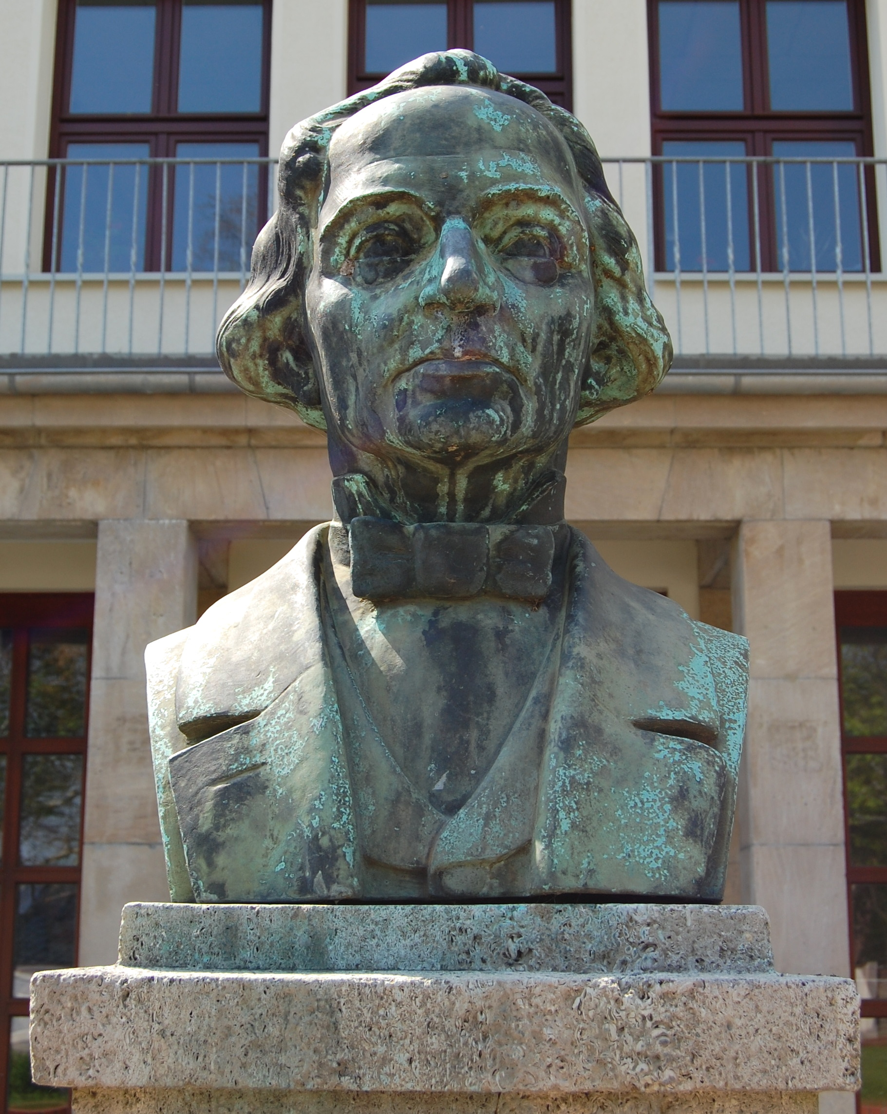 Büste Justus von Justus von Liebig vor der Berufsschule Westerhüsen, Bildhauer: Max Roßdeutscher, 1953